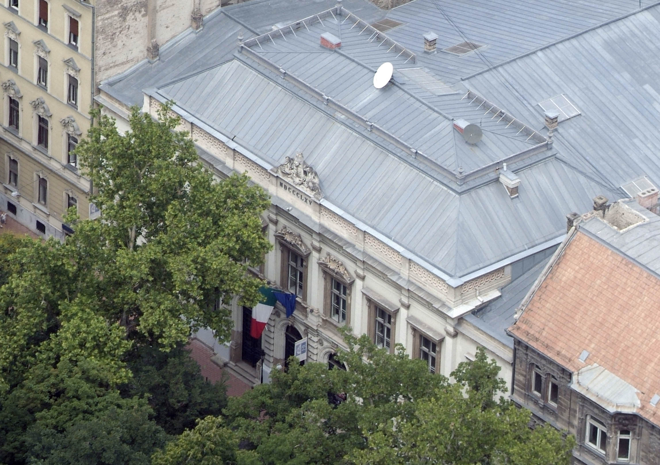 Budapesti Olasz Kultúrintézet légi felvételen